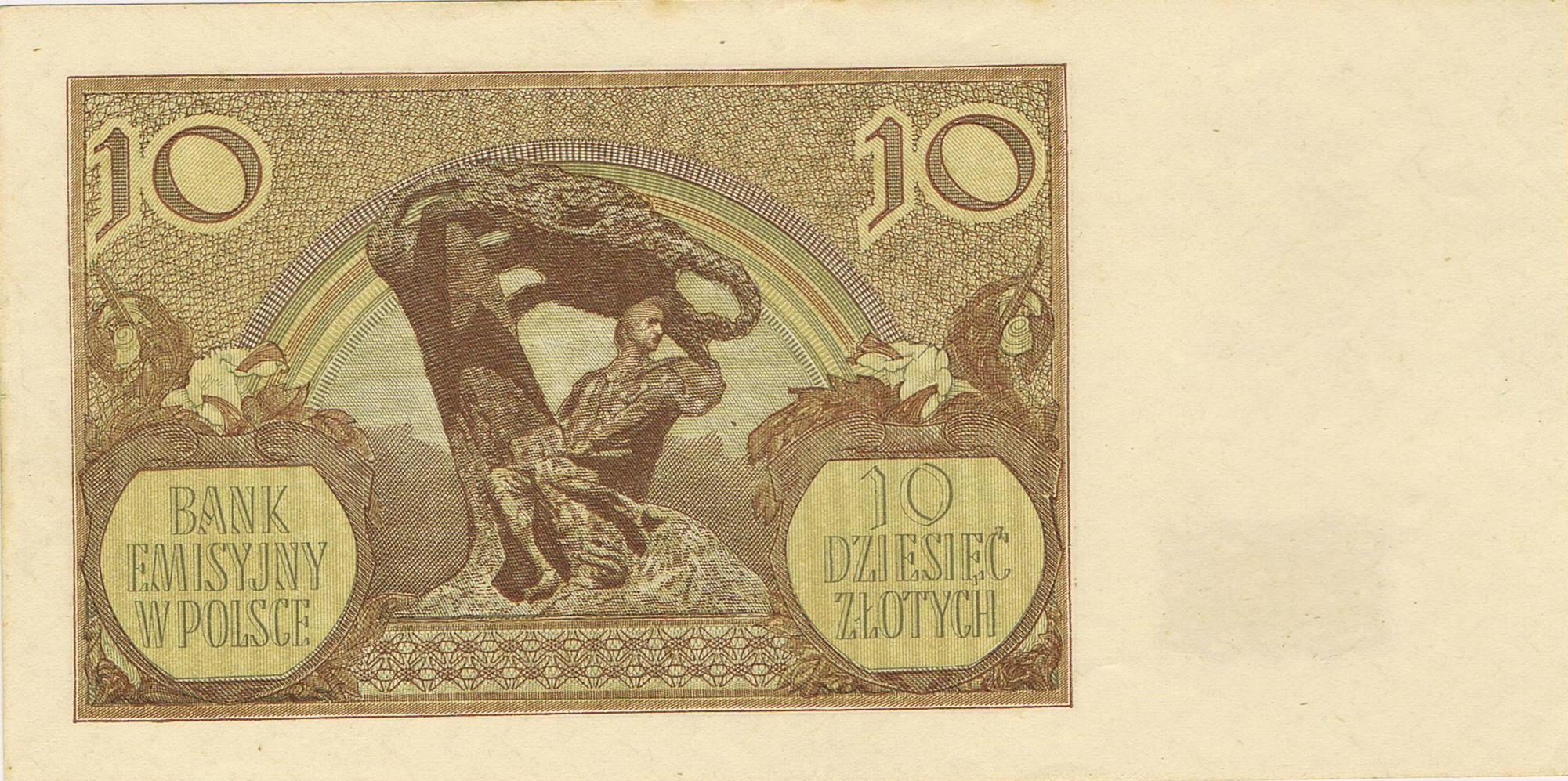 10 złotych = 5 Reichsmark